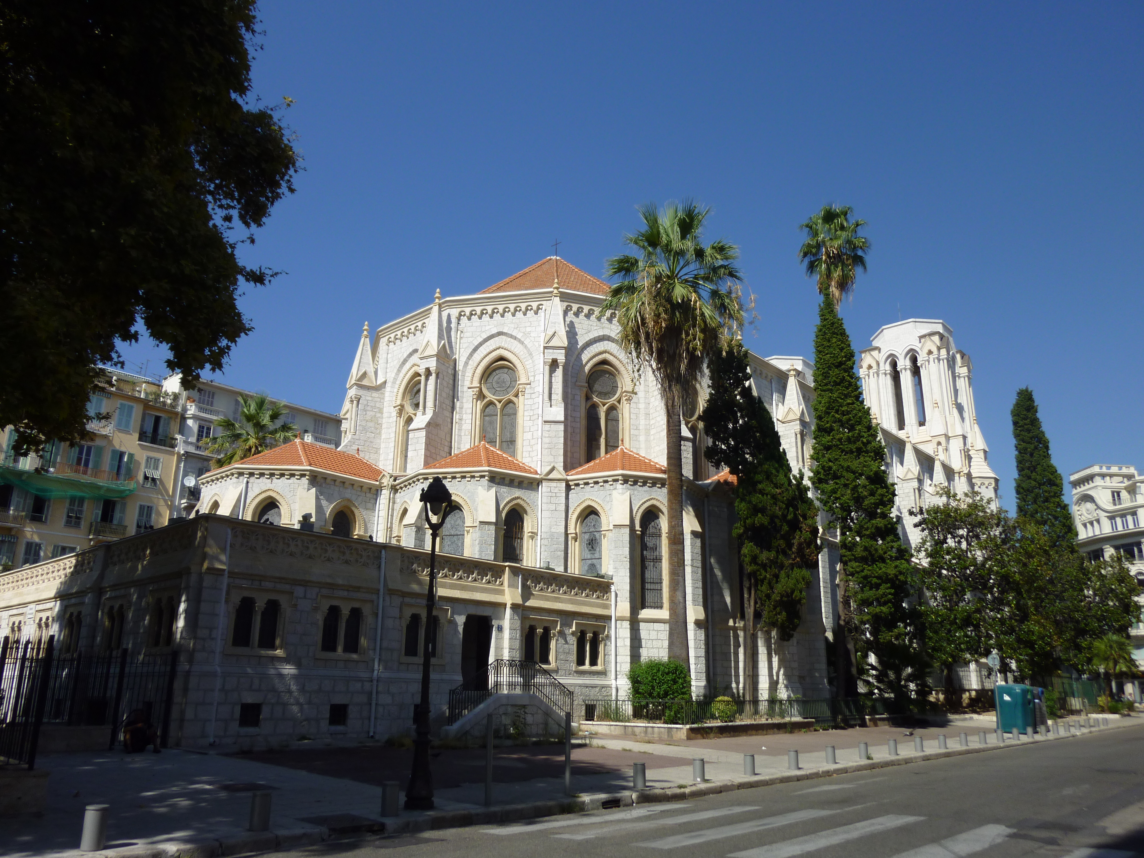 La basilique Notre-Dame de Nice (Alpes-Maritimes, France) Prise depuis la rue d'Italie.